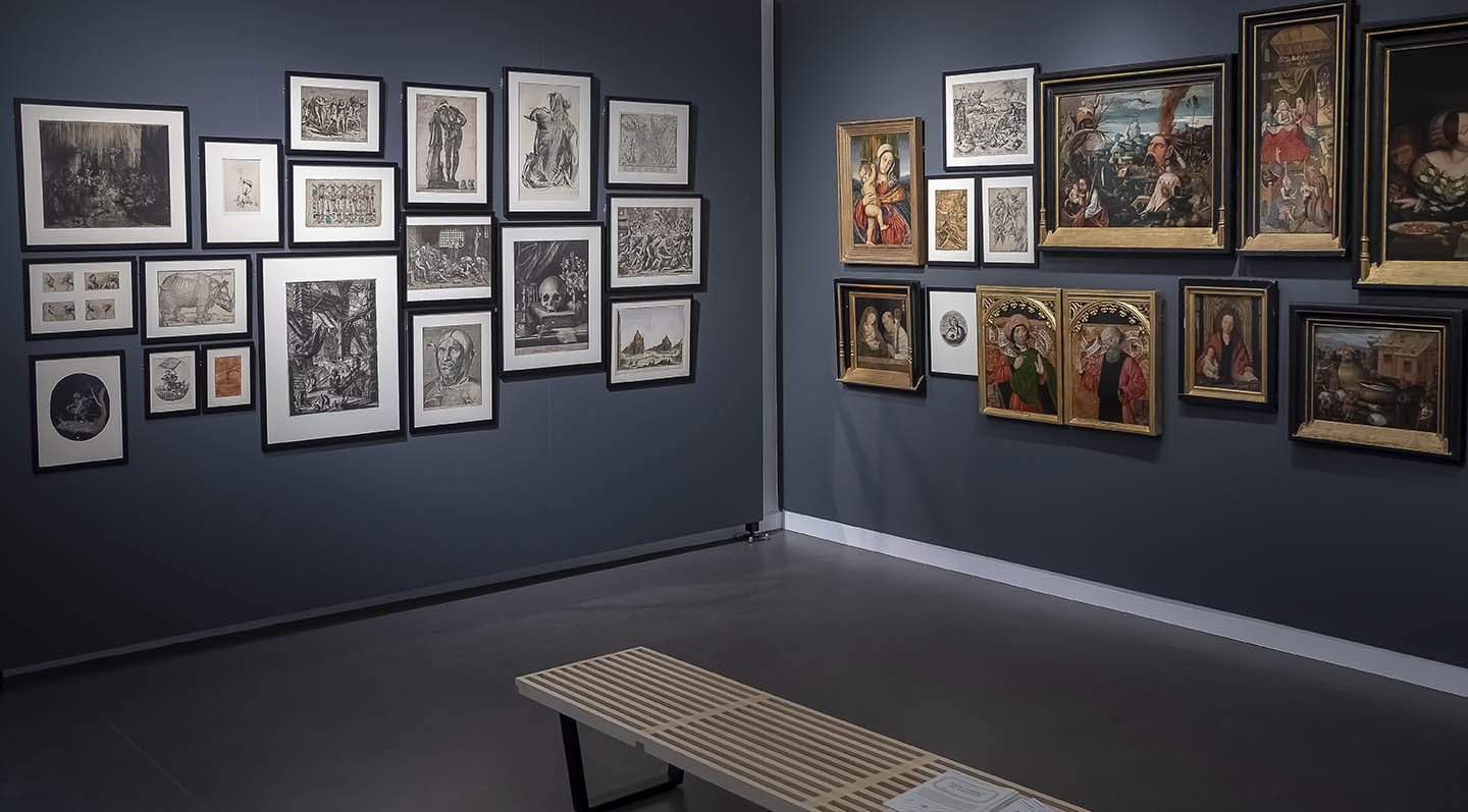 Vue intérieure du Musée Wittert, exposition semi-permanente "Merveilles et curiosités des collections d'art de l'Université de Liège", photo Jean-Michel Bourdoux, avril 2018.